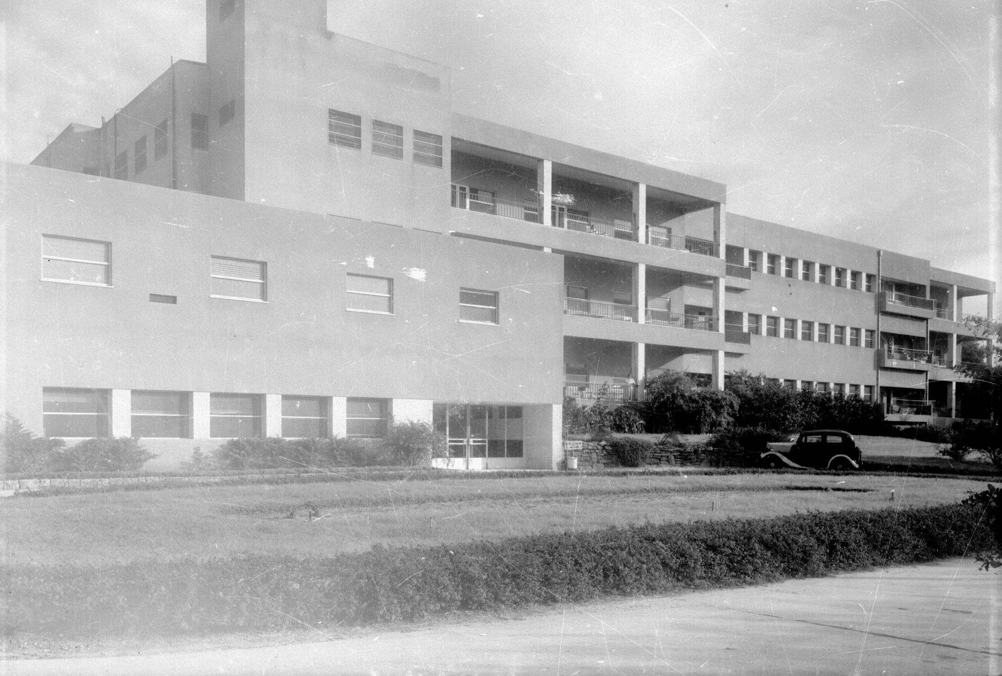 אוסף צילומים של הצלם זולטן קלוגר טווח מספרי התשלילים 23061 - 23483: בית החולים ביילינסון - מראה כללי